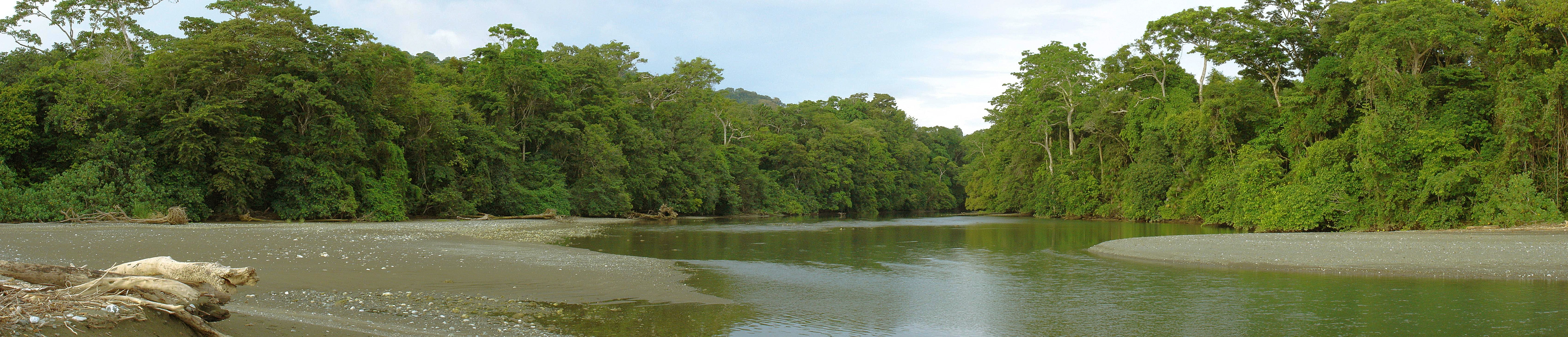 Río Claro, en parque nacional Corcovado, Costa Rica.